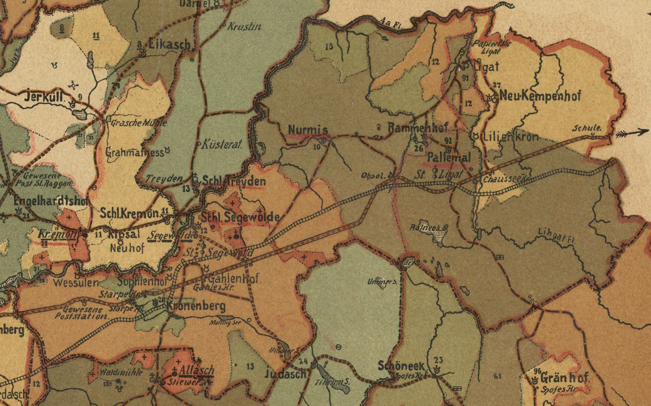 Sigulda kihelkonna mõisad 1905. aastal